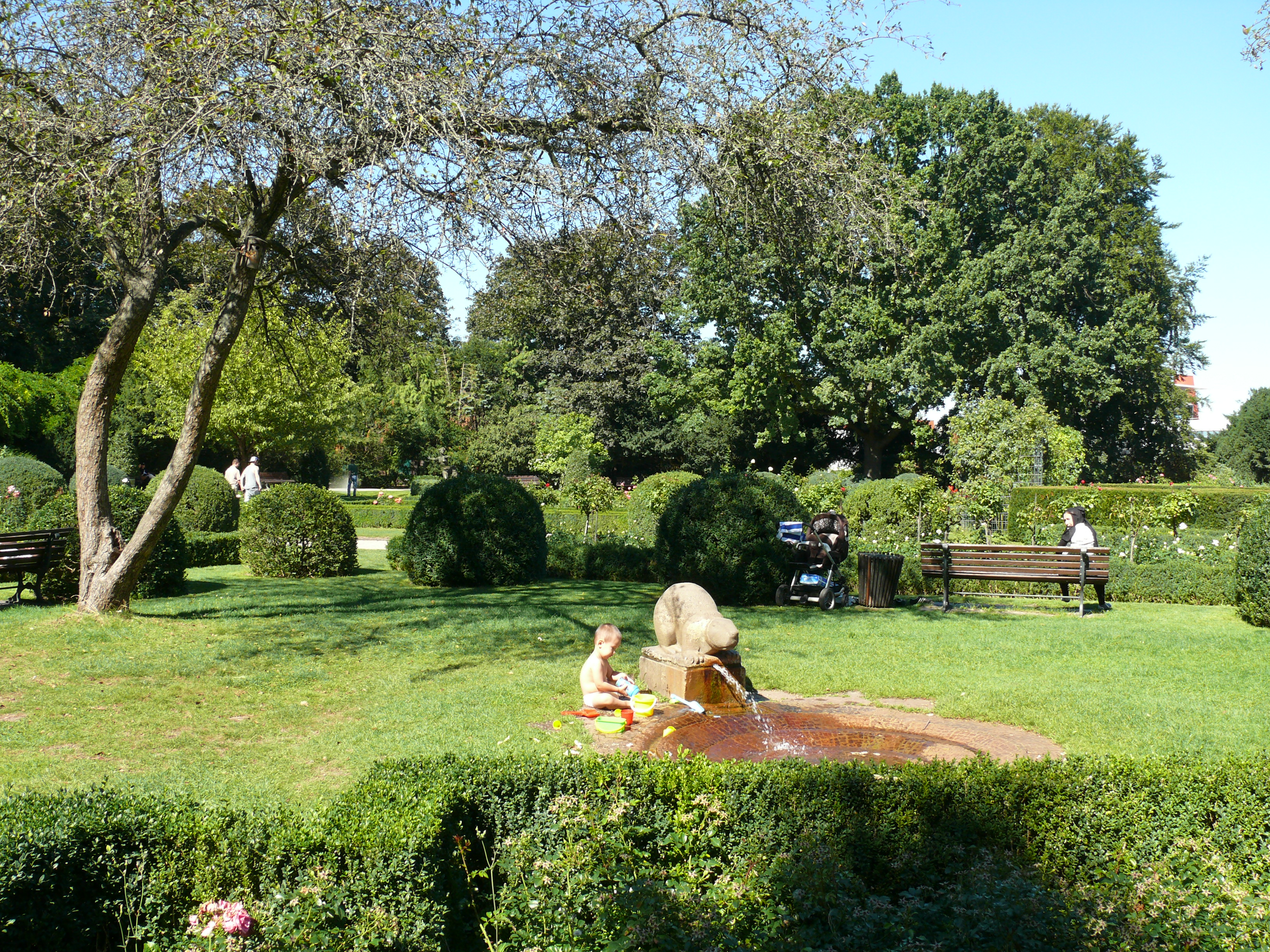 Berlin-Gesundbrunnen Humboldthain Rosengarten